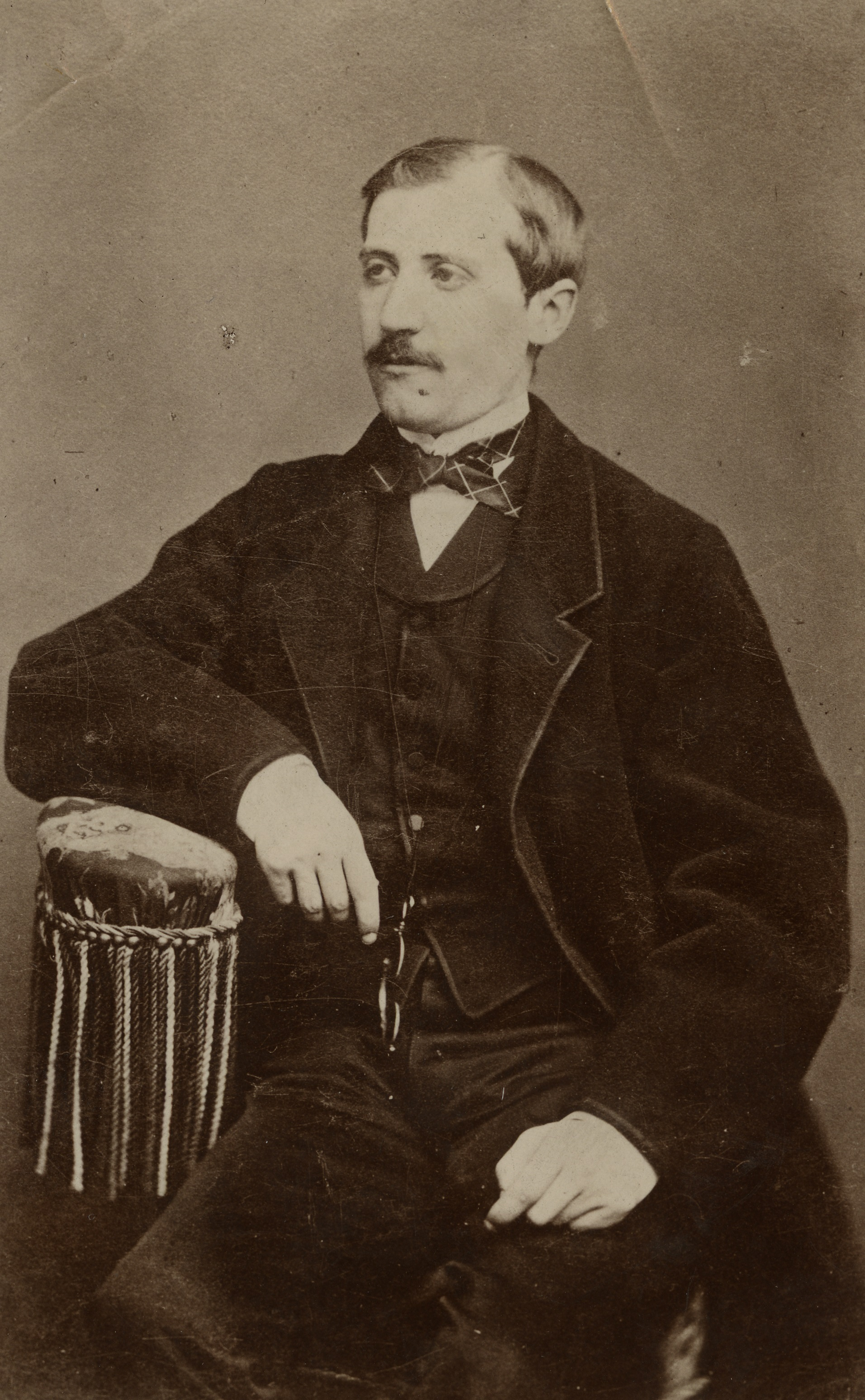 Portrait de Ernest Roschach. E. Delon. Toulouse. Vers 1900. Reproduction ancienne d'un portrait photographique de Ernest Roschach (1837-1909), archiviste de la mairie de Toulouse(Haute-Garonne), historien, conservateur des musées des Augustins et Saint Raymond, à Toulouse. Le portrait d'origine semble daté du début des années 1880, car Roschach ne porte pas la légion d'honneur reçue en 1882. Domaine public. Eugène Delon, photographe à Toulouse de 1866 à 1894, est né le 13 février 1823, décédé le 22 septembre 1894. Ville de Toulouse, Archives municipales, 1 Fi 637